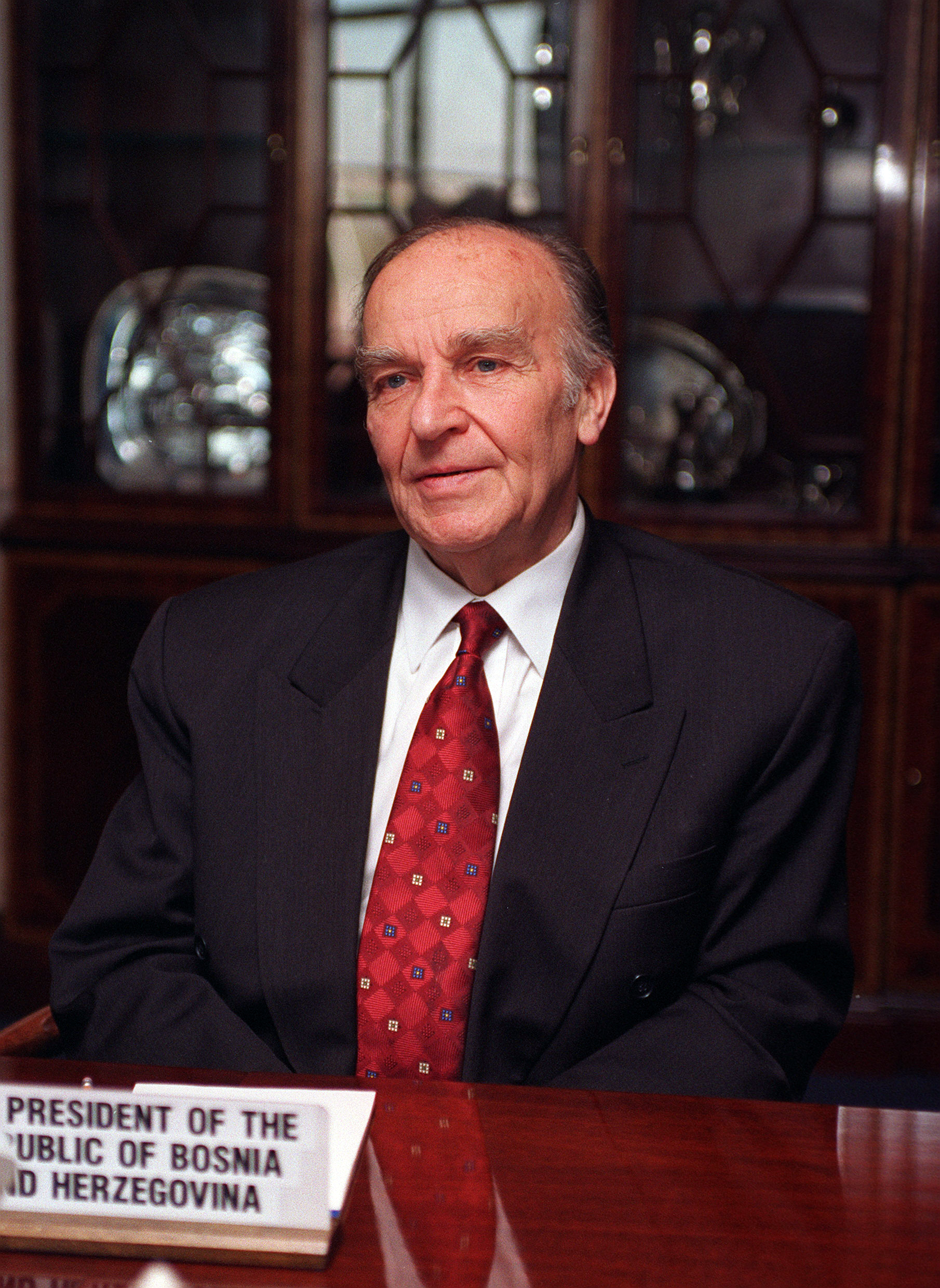 Former Bosnian president Alija Izetbegović